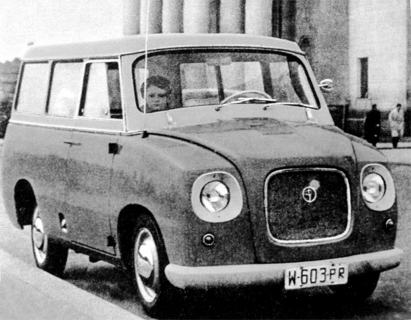 FSO Syrena Mikrobus - furgon na bazie samochodu Syrena